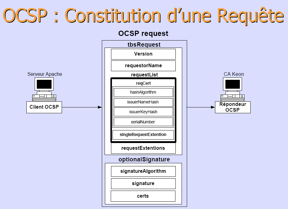 OCSP Request